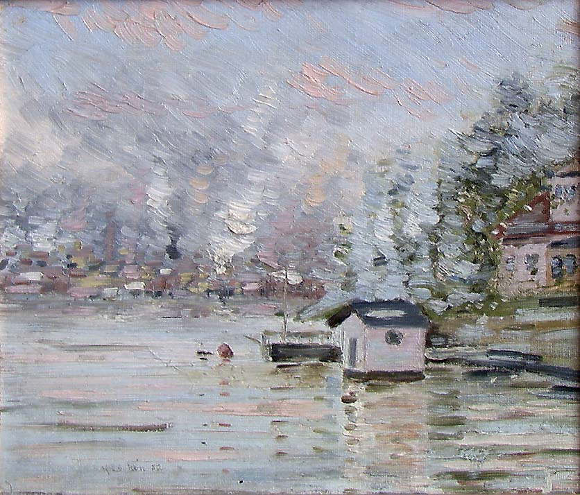 Fra Kongshavn bad.